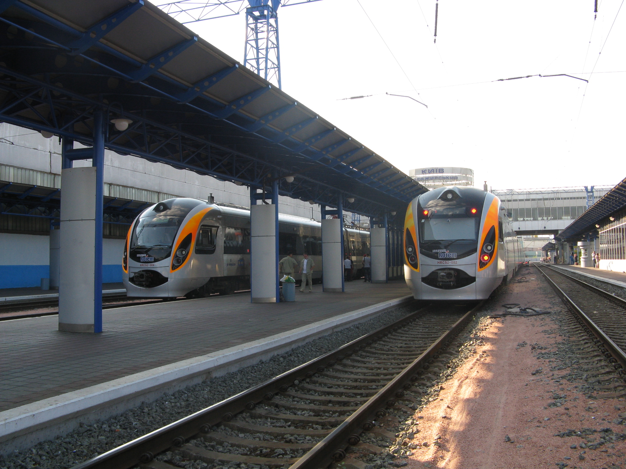 Hyundai Rotem HRCS2-004 и 002 на станции Киев Пассажирский